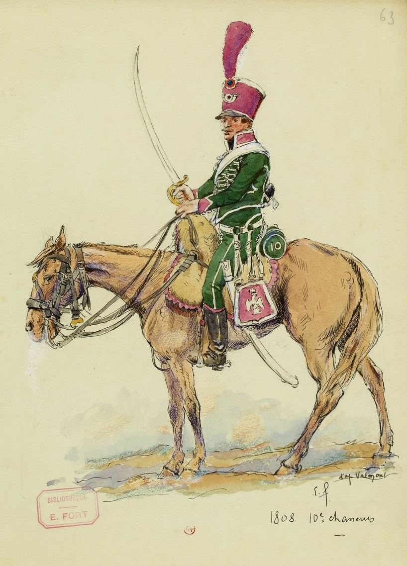 Chasseur à cheval du 10e régiment, 1808. L'uniforme est celui décrit par le recueil de Valmont.